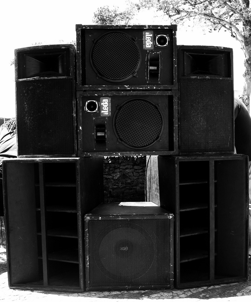 Foto:MFR